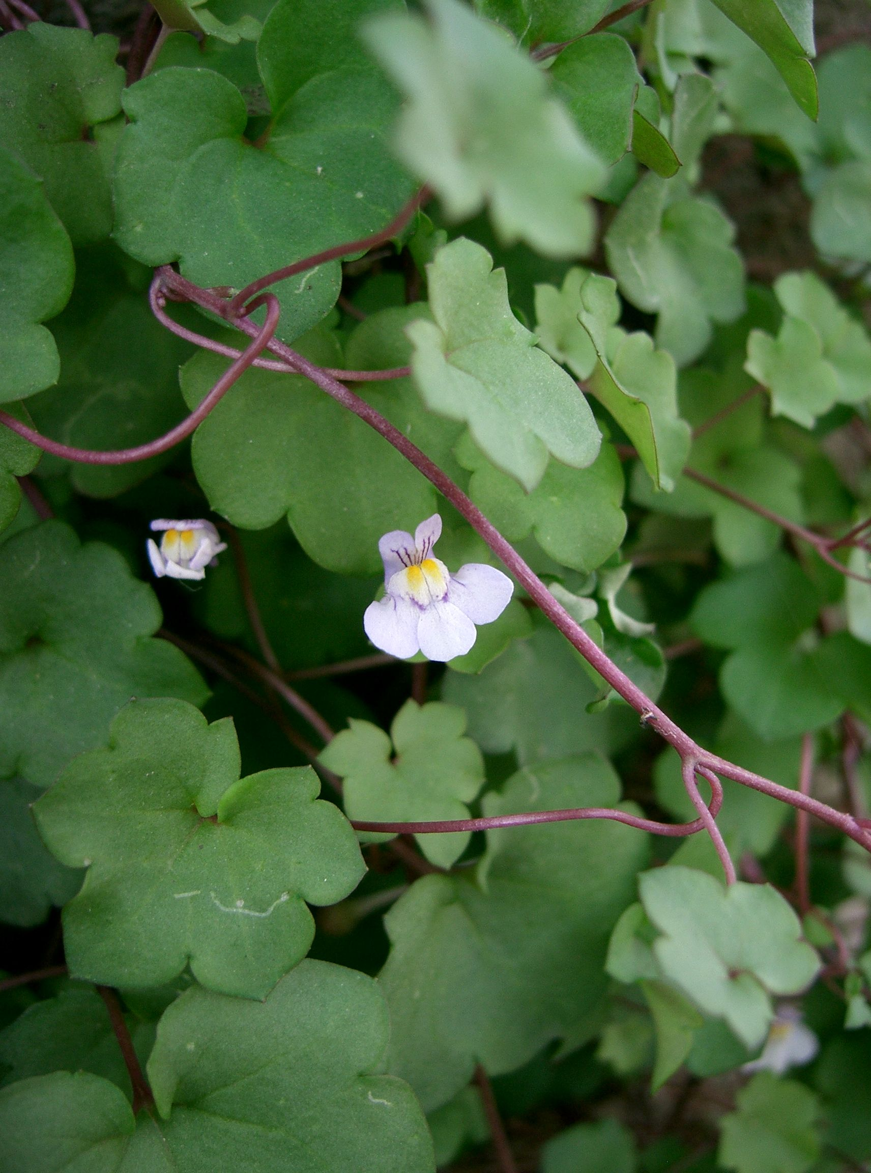 Cymbalaria muralis